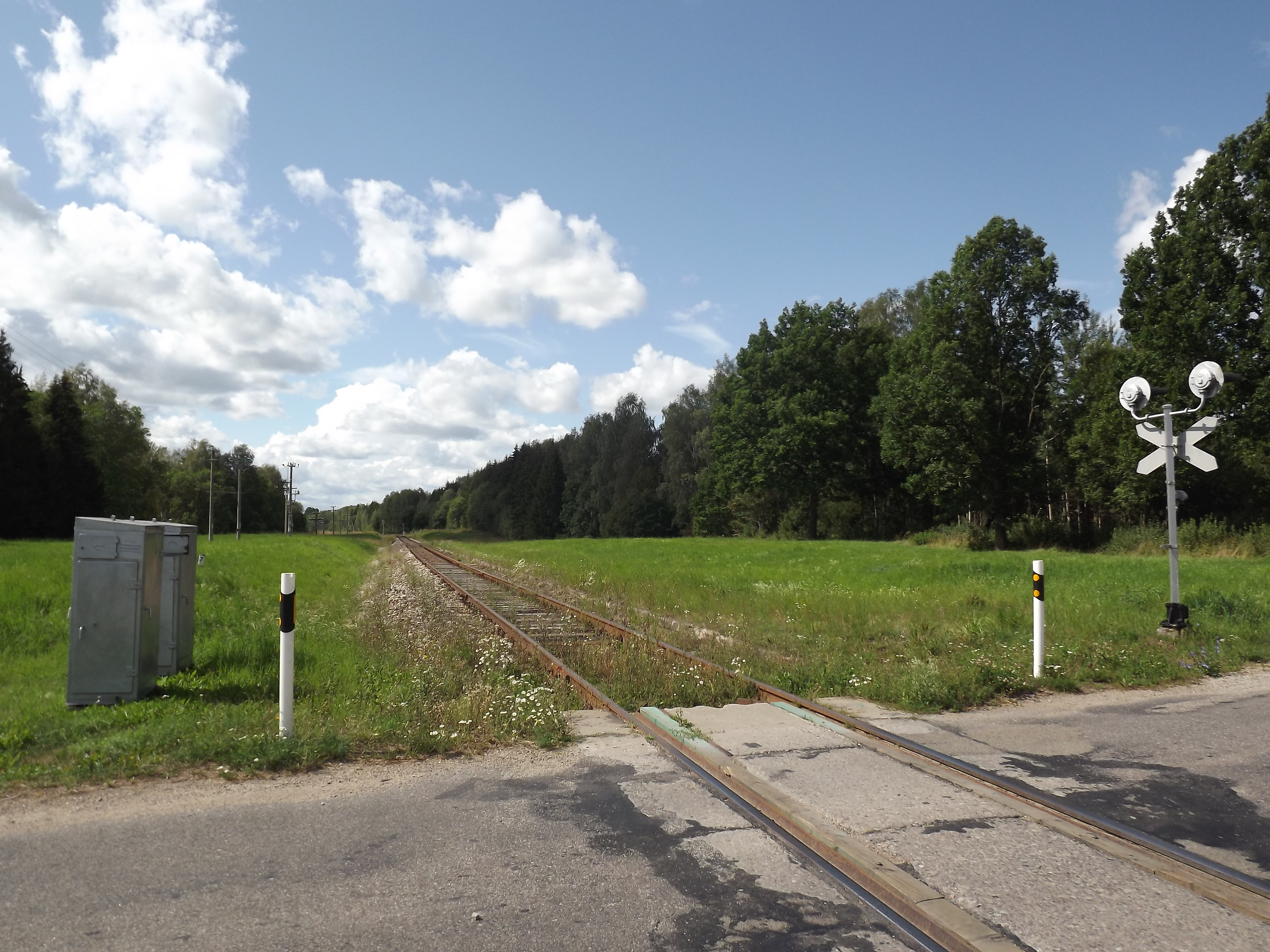 Endine Otsa raudteepeatus aastal 2014. Paremal perrooni jäänused.